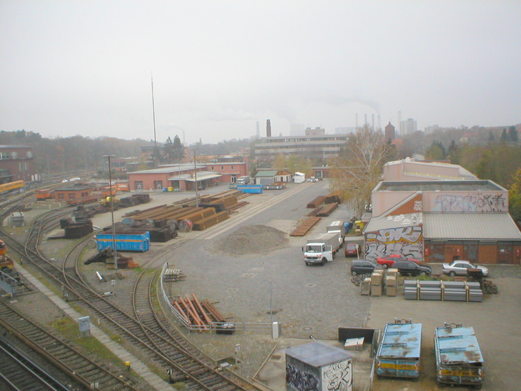 U-Bahn Berlin - Teil des Werkgeländes Berliner Kleinprofil-U-Bahn-Hauptwerkstatt Grunewald in der Nähe des Bahnhofes Olympia-Station (U2). Am Horizont die Schornsteine der Kraftwerke Reuter (alt) und Reuter West